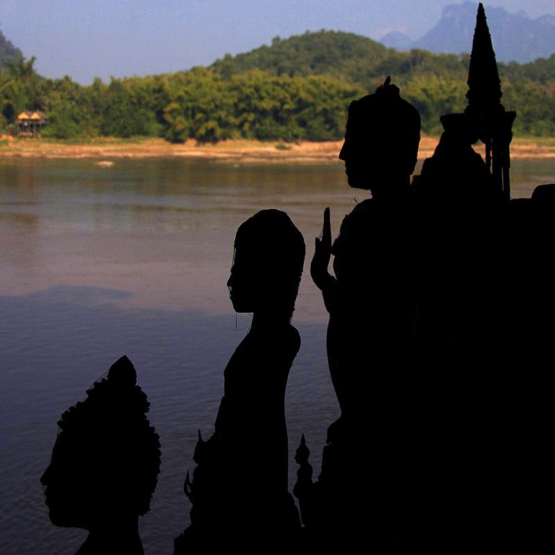 Standing Buddhas statues Luang Prabang style, Pak Ou Caves, Laos